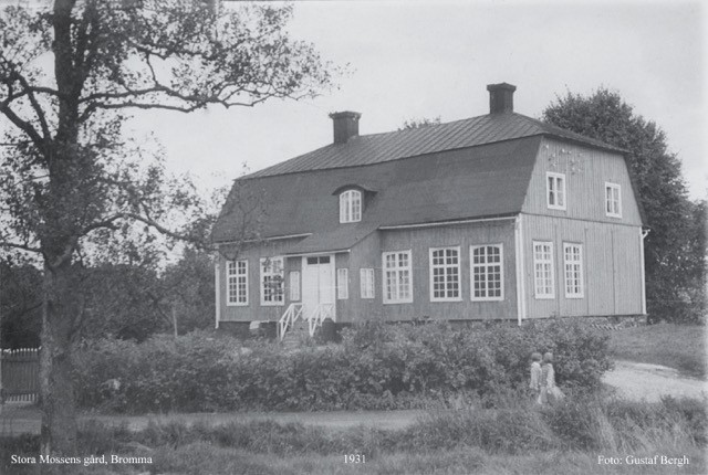 Stora Mossens gård, Bromma, Stockholm, 1931.Fotografi från norr, platsen är ungefär där Mossvägen idag möter Nyängsvägen, vid Mossplan. Trädet i förgrunden tillhör troligen den allé som ledde fram till gården och som kantade vägen vid nuvarande Stora Mossens backe, som gick upp från Gustav III:s Drottningholmsvägen. På bilden står de två sista trädparen i allén fortfarande kvar på den obebyggda tomten mellan Stavgårdsgatan och Mossvägen. Stora Mossens gård låg på den plats där nu Bromma gymnasiums aula ligger.